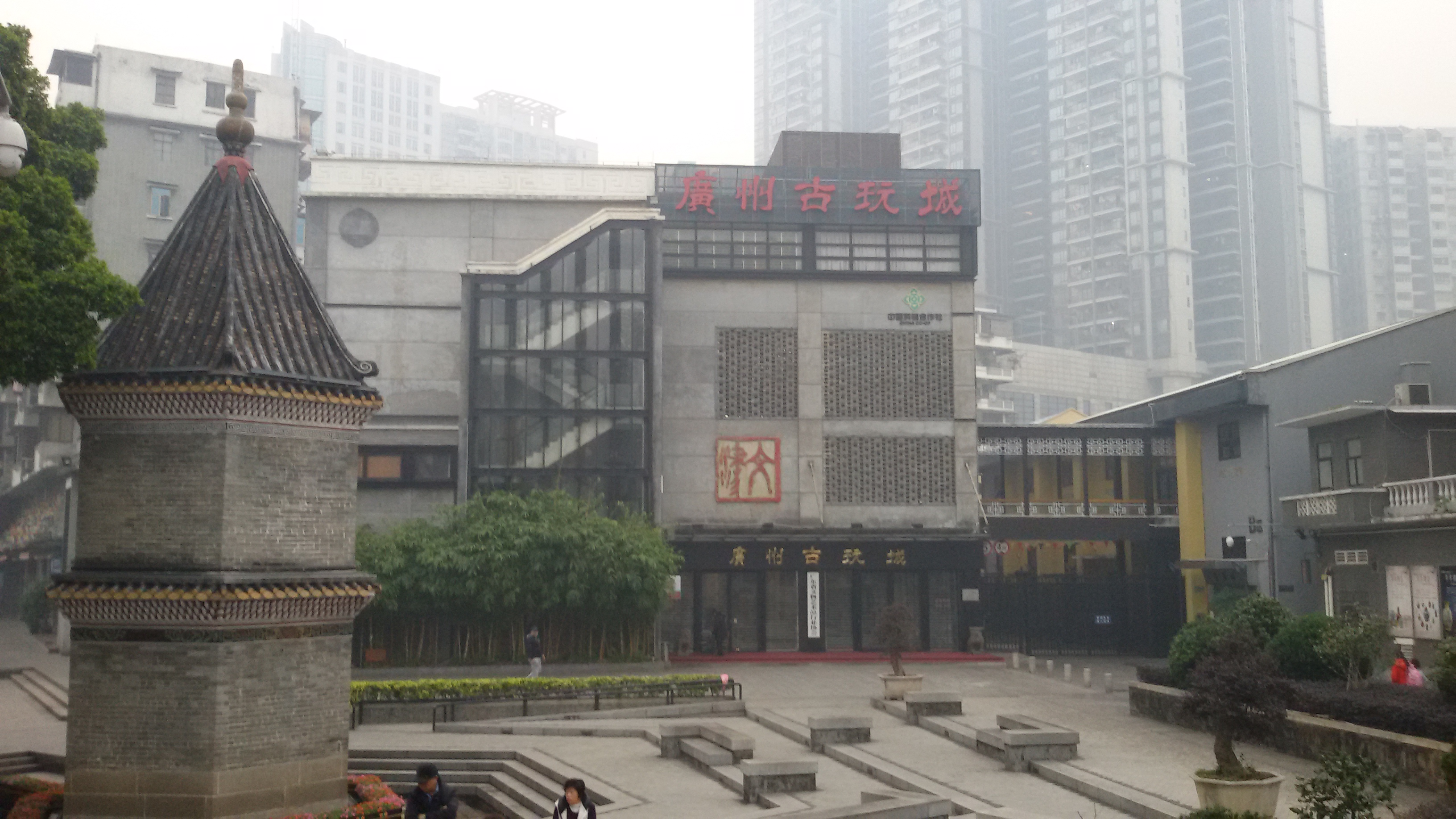 粵語: 廣州古玩城